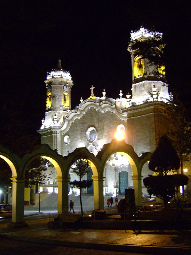 La Catedral de la ciudad de Potosí